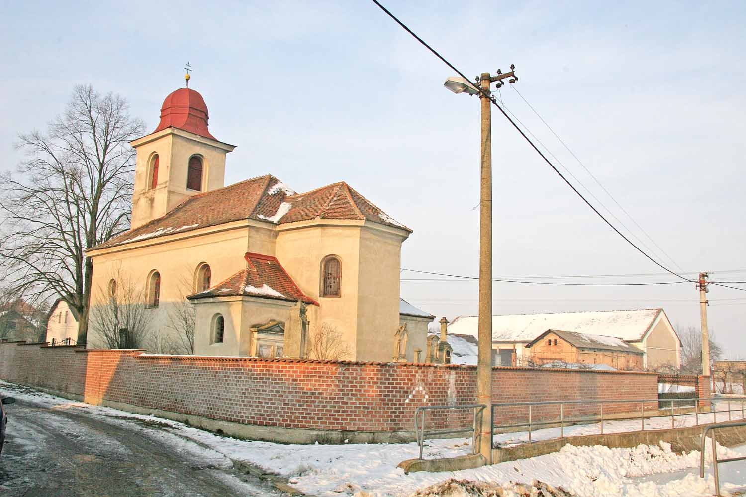 Kostel Nejsvětější Trojice v Praskačce